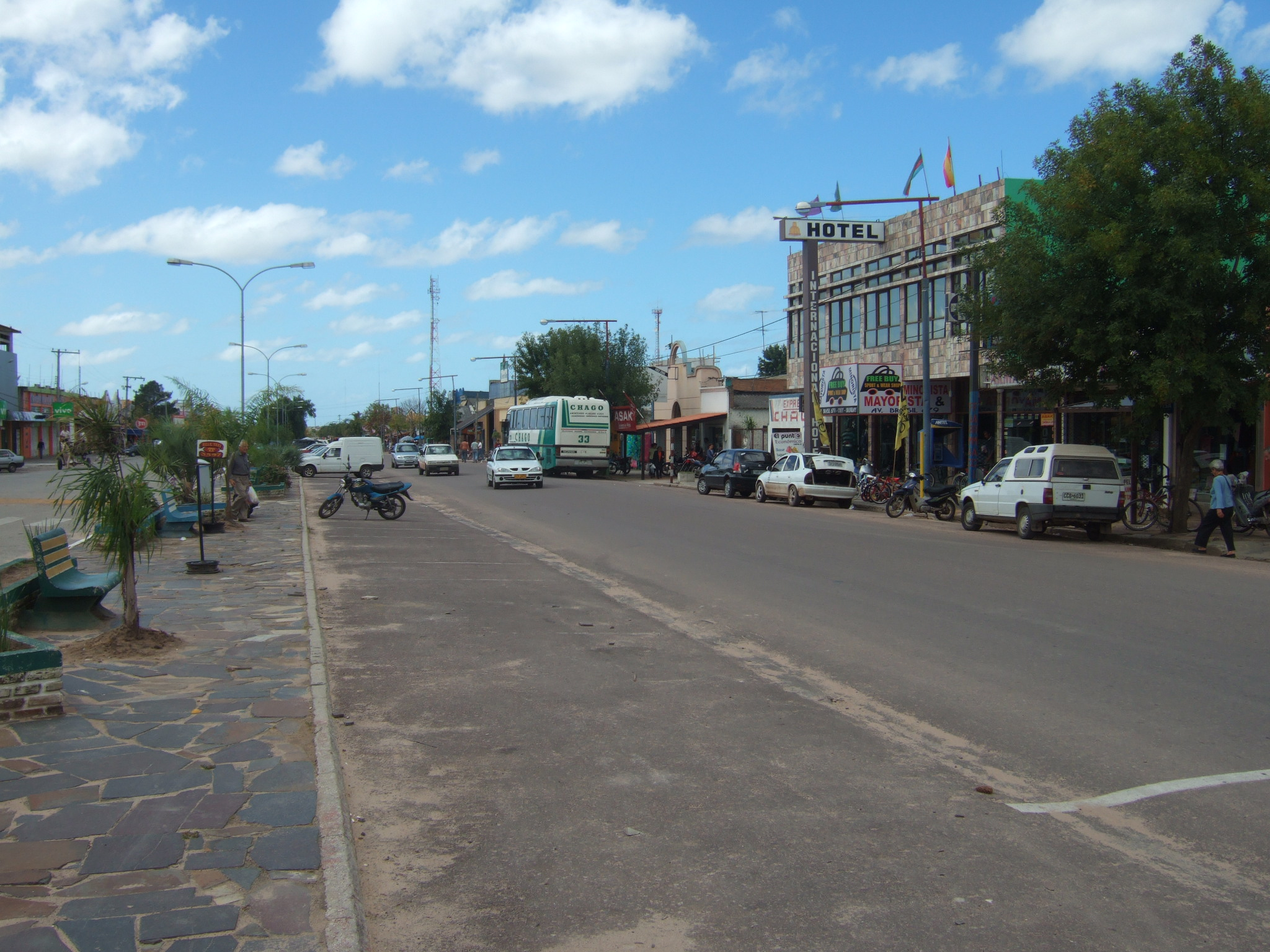 Avenida Brasil/Uruguay, Chuy, Departamento de Rocha, Uruguay